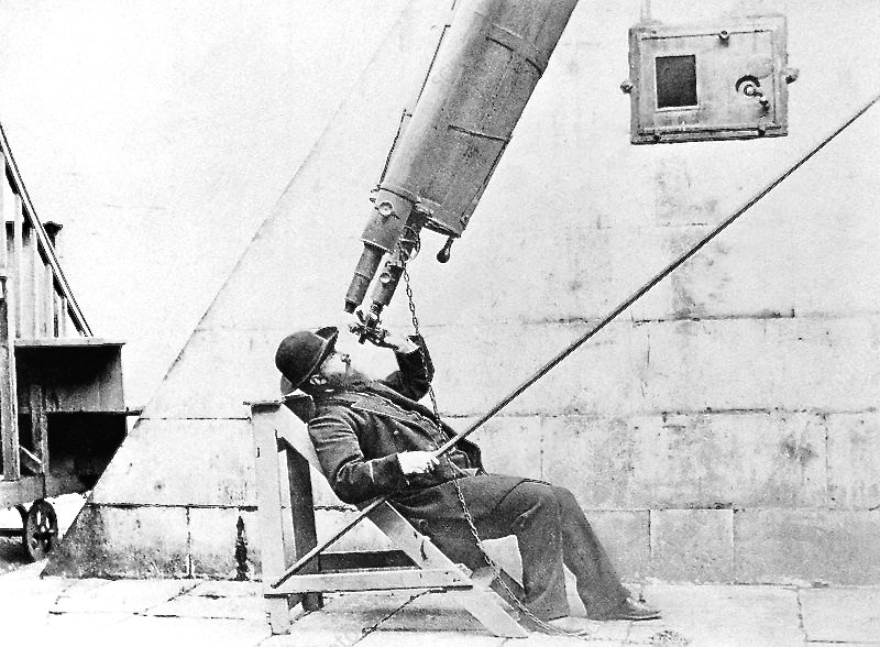 Der dänische Astronom August William Doberck (1852–1941) am Refraktor von Schloss Markree in der irischen Grafschaft Sligo. Dessen seinerzeit weltgrößtes Objektiv mit 33,8 cm (13,3 Zoll) Öffnung war 1831 vom Franzosen Robert-Aglaé Cauchoix (1776–1845) für Edward Joshua Cooper (1798–1863) hergestellt worden. Das benötigte Flintglas stammte vom Schweizer Pierre-Louis Guinand (1748–1824). Das 7,6 m (25 Fuß) lange Teleskop war in einem offenem Gebäude auf einer Pyramide aus schwarzem Marmor montiert. Collection Royal Astronomical Society.